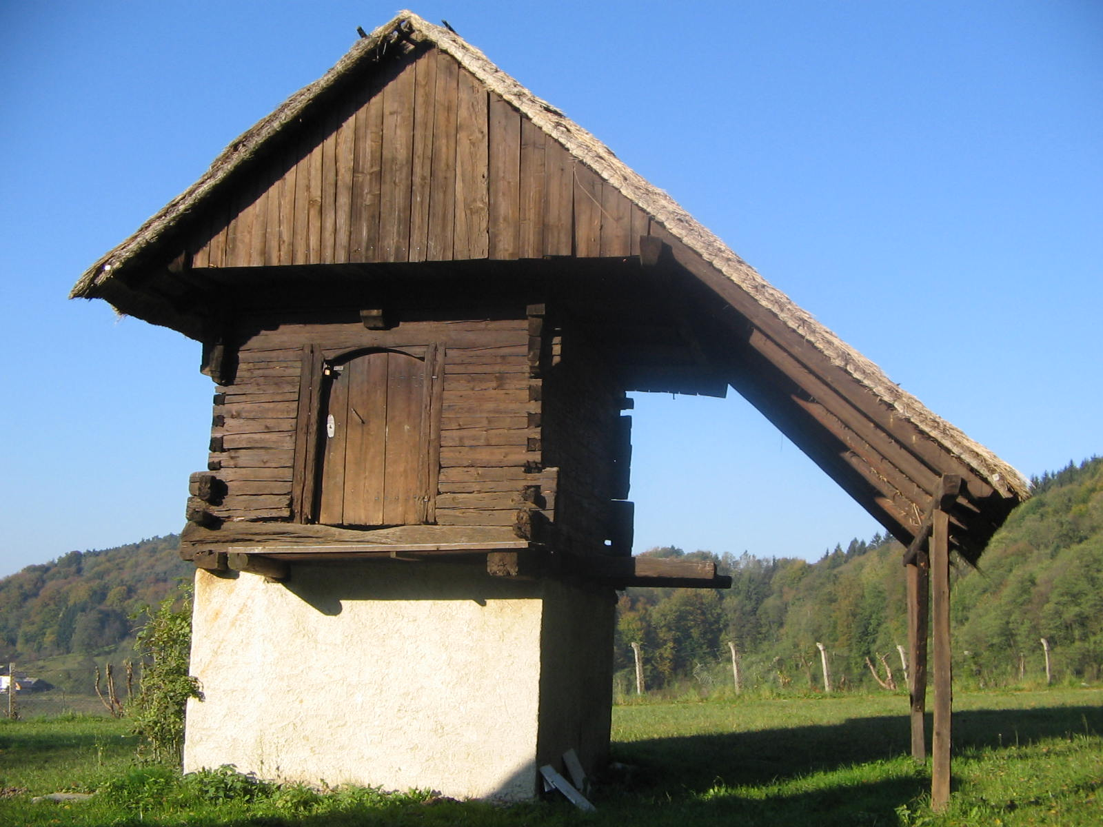 Open air museum Zaprice, granary, begining 19th century Quelle: eigene Aufnahme 18. 10. 2005 Fotograf: Janez Novak, Ljubljana, Slovenija